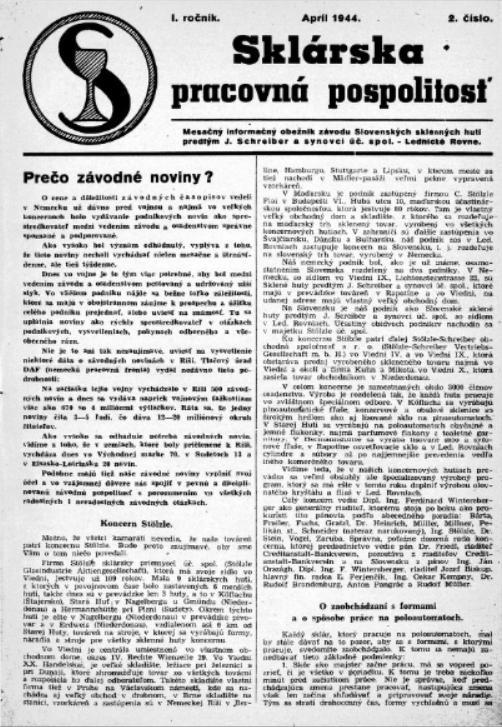 Titulný list mesačníka Sklárska pracovná pospolitosť